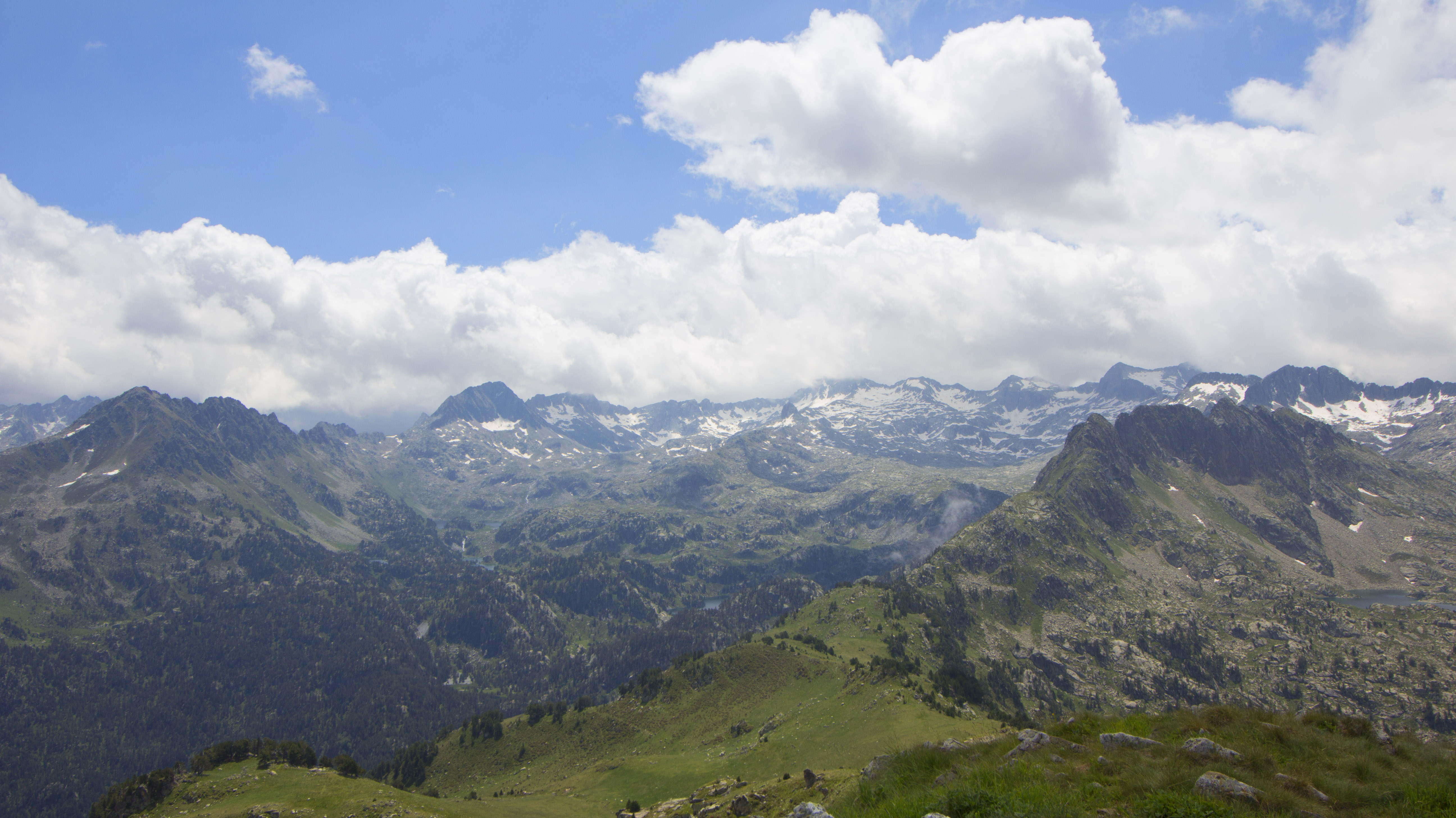 Circ de Colomers, vall d'Aran